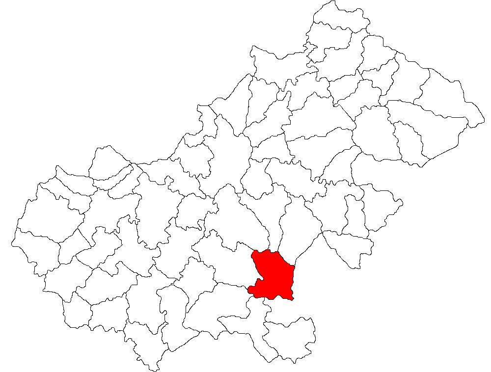 Categorie:Hărţi ale judeţului Satu Mare